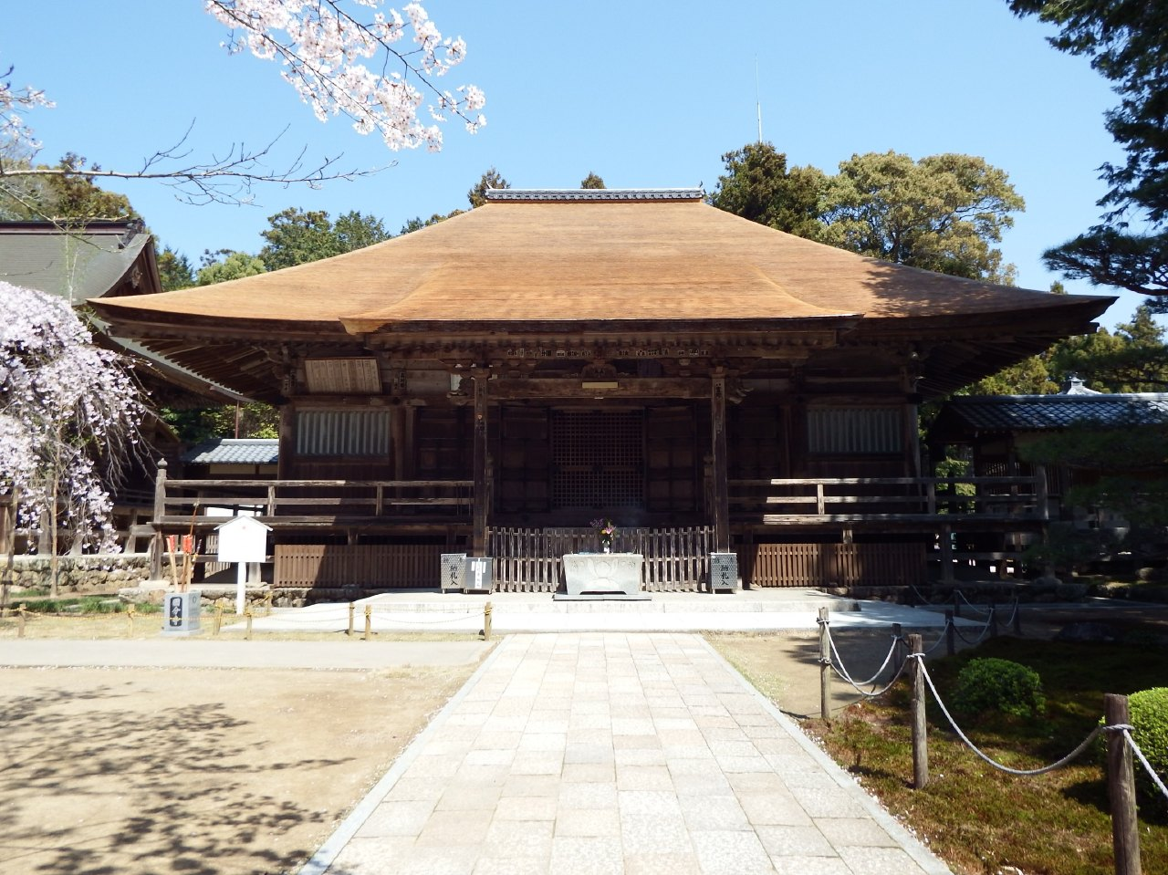 土佐国分寺の本堂